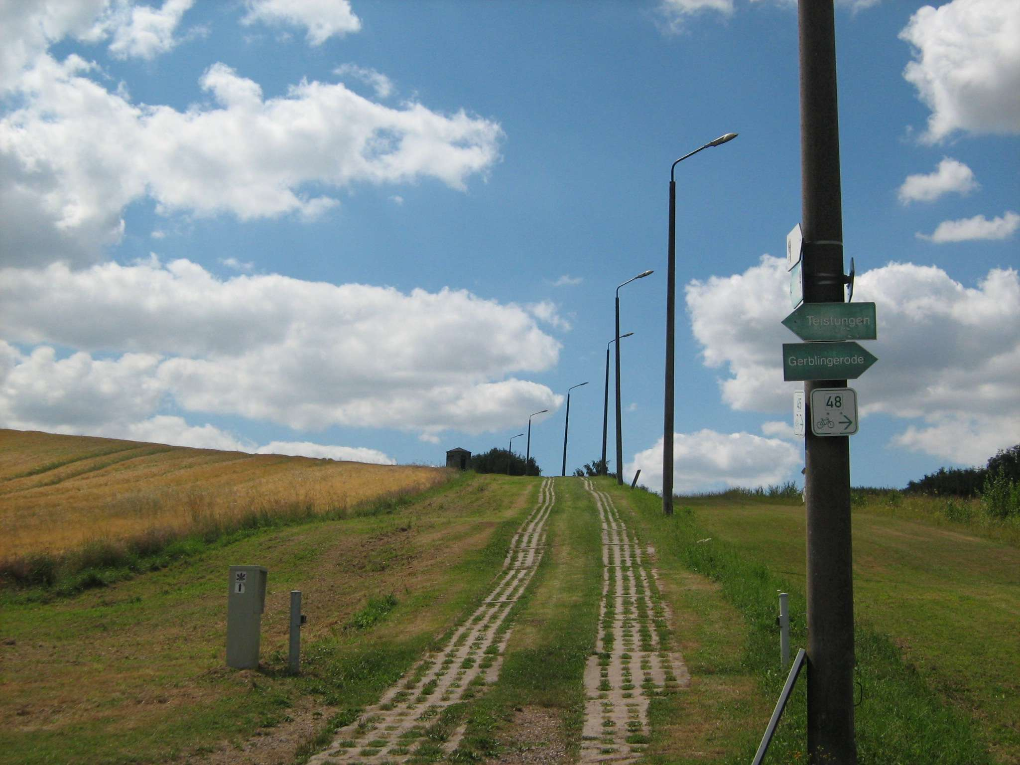 ehemaliger Kolonnenweg am früheren Grenzübergang Duderstadt - Teistungen